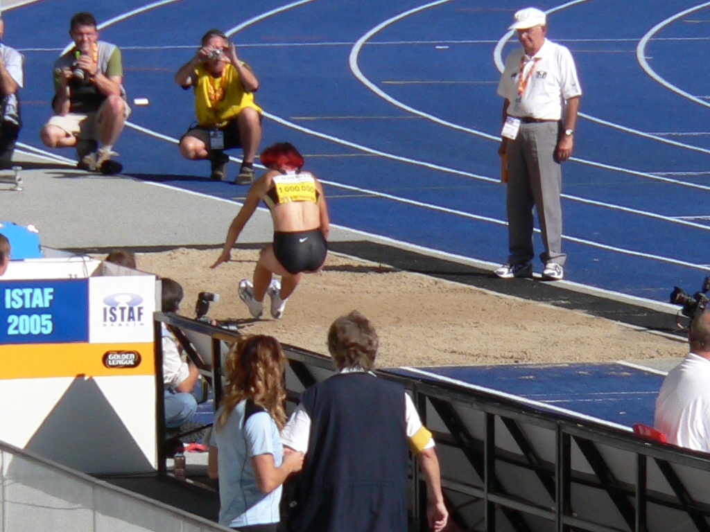 Tatyana Lebedeva, ISTAF 2005 in Berlin